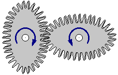 Zwei elliptische Zahnräder bewirken, dass die sonst sinusförmige Schwenkbewegung linearer wird.